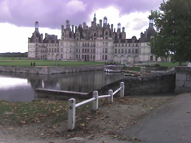 Château de Chambord, France